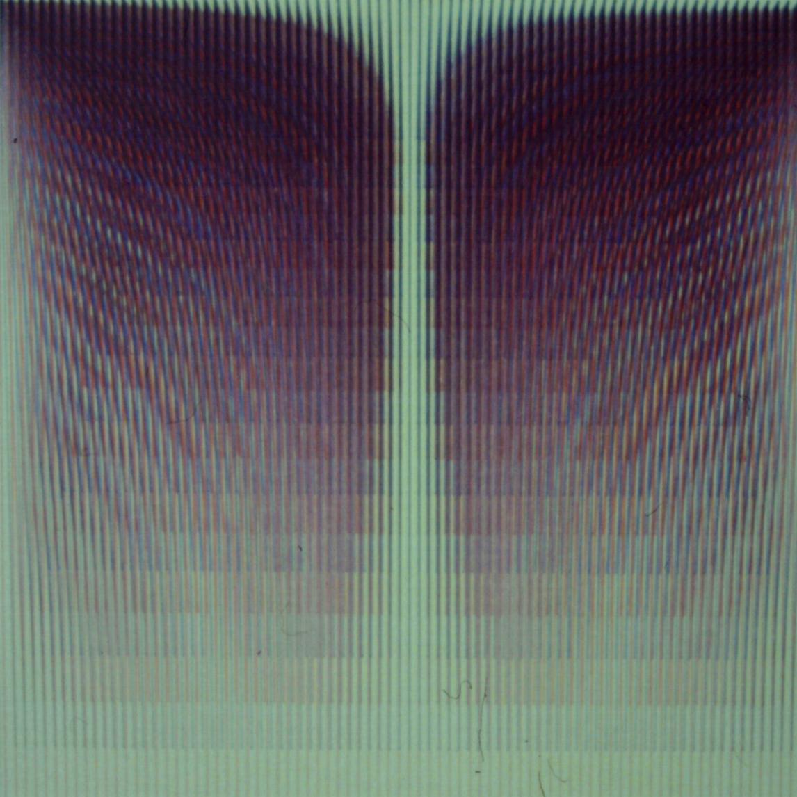 Tusche auf papier